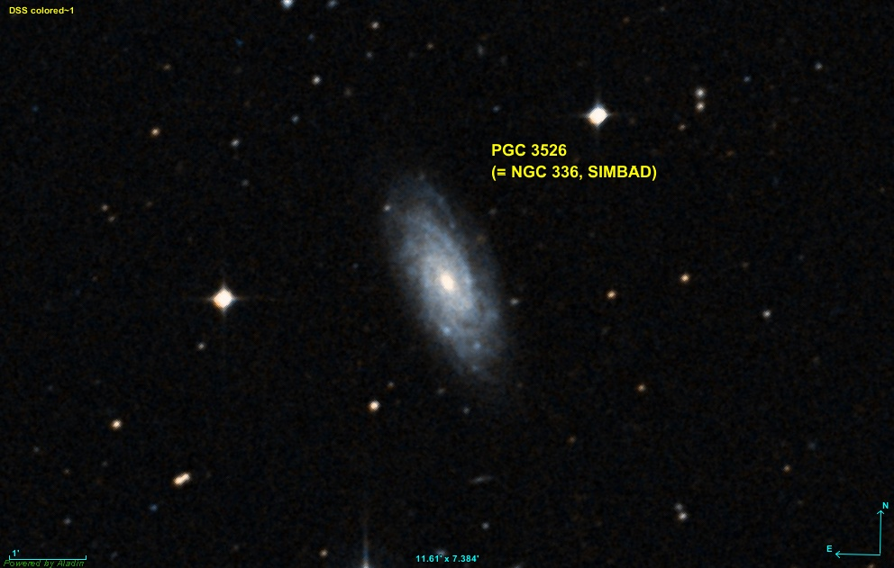 Réaliser avec le logiciel Aladin et les données de DSS.